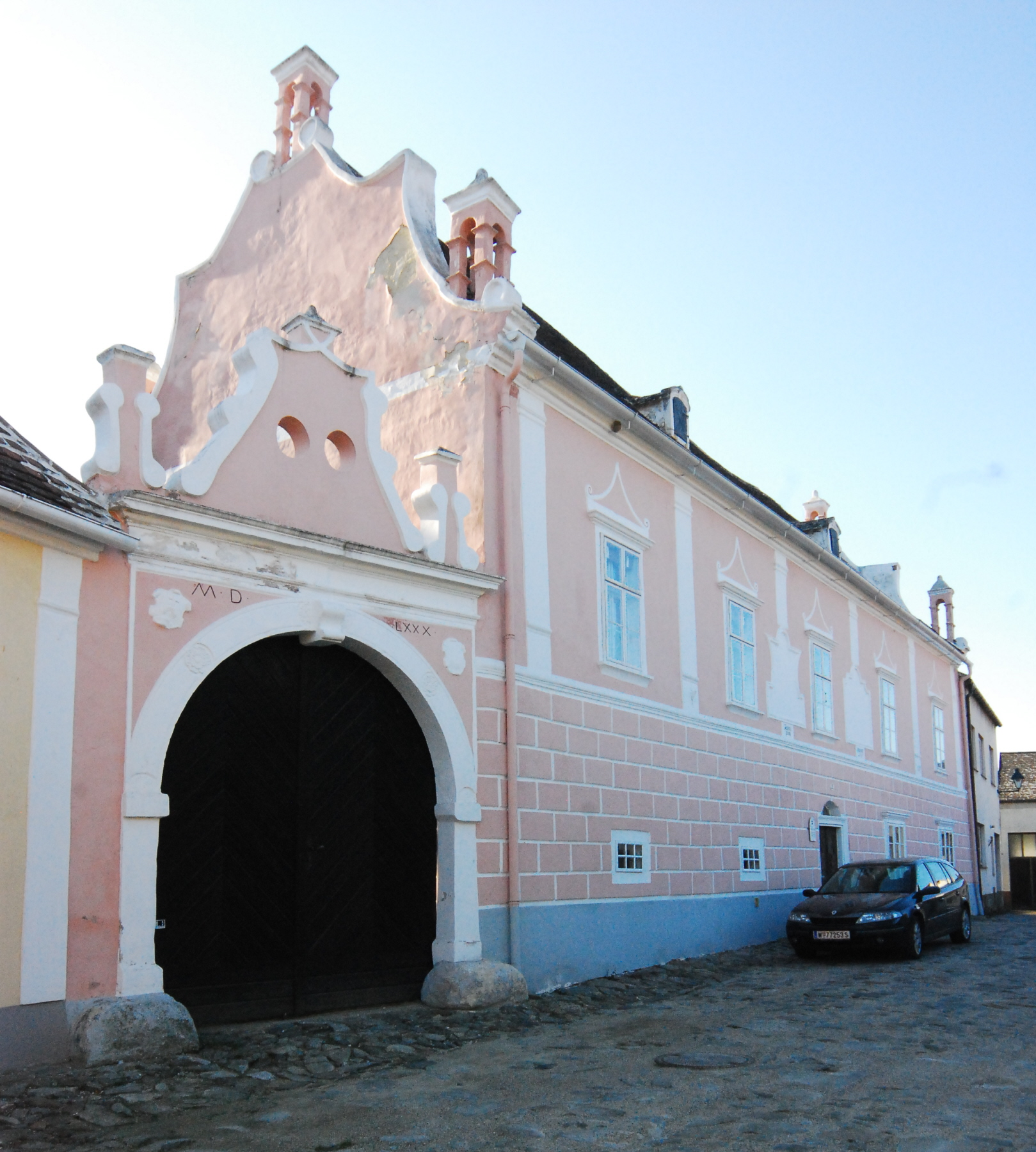 Roter Hof